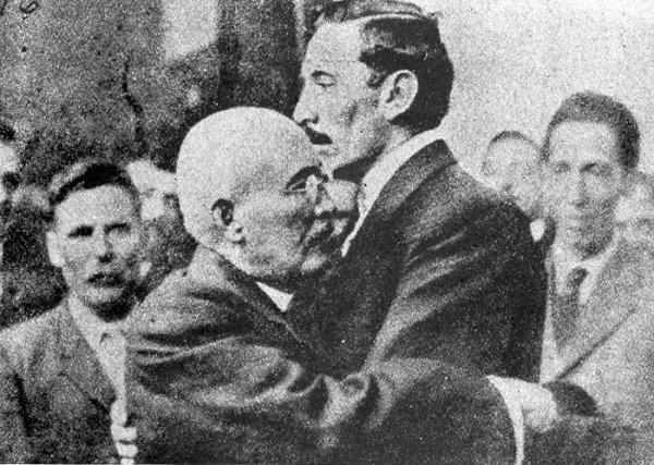 Fotografía de Victoriano Huerta (izquierda) y Pascual Orozco (derecha) tomada de Latino Studies Resources - Indiana University at Bloomington. Dado que Orozco falleció en es:1915 esta imagen se considera en el dominio público en los Estados Unidos.